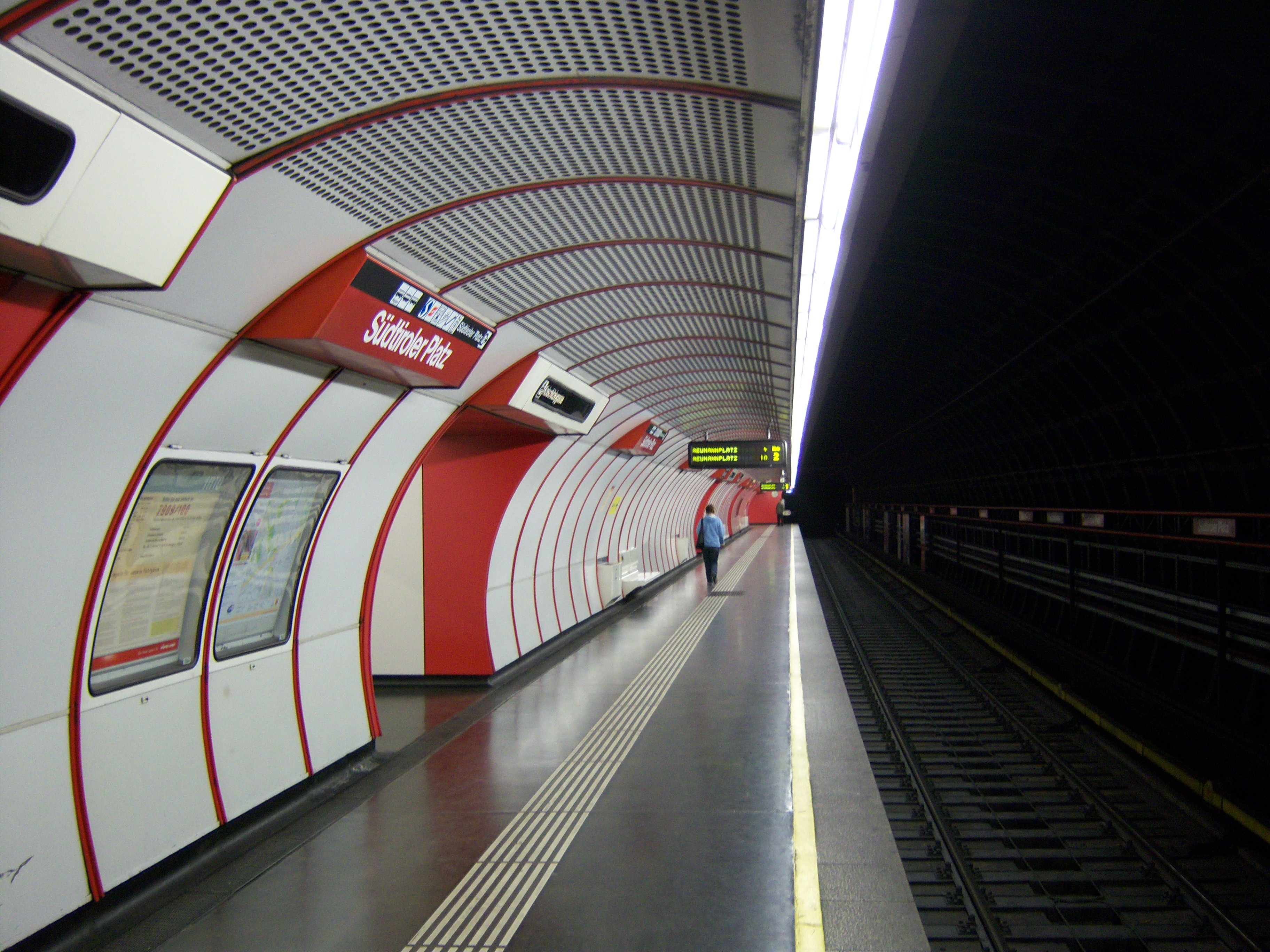 U-Bahn-Station Südtiroler Platz